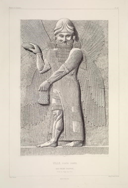 Khorsabad. Hochrelief von verziertem Eingangstor. Gottheit (Genie) mit vier Flügeln mit Gesicht von vorn.